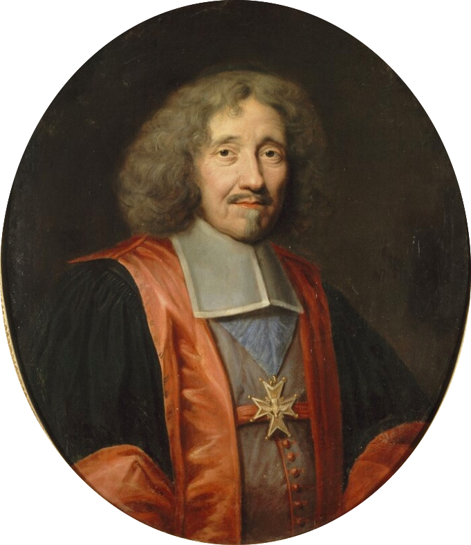 Michel Le Tellier (1603-1685), minister of Louis XIV de France